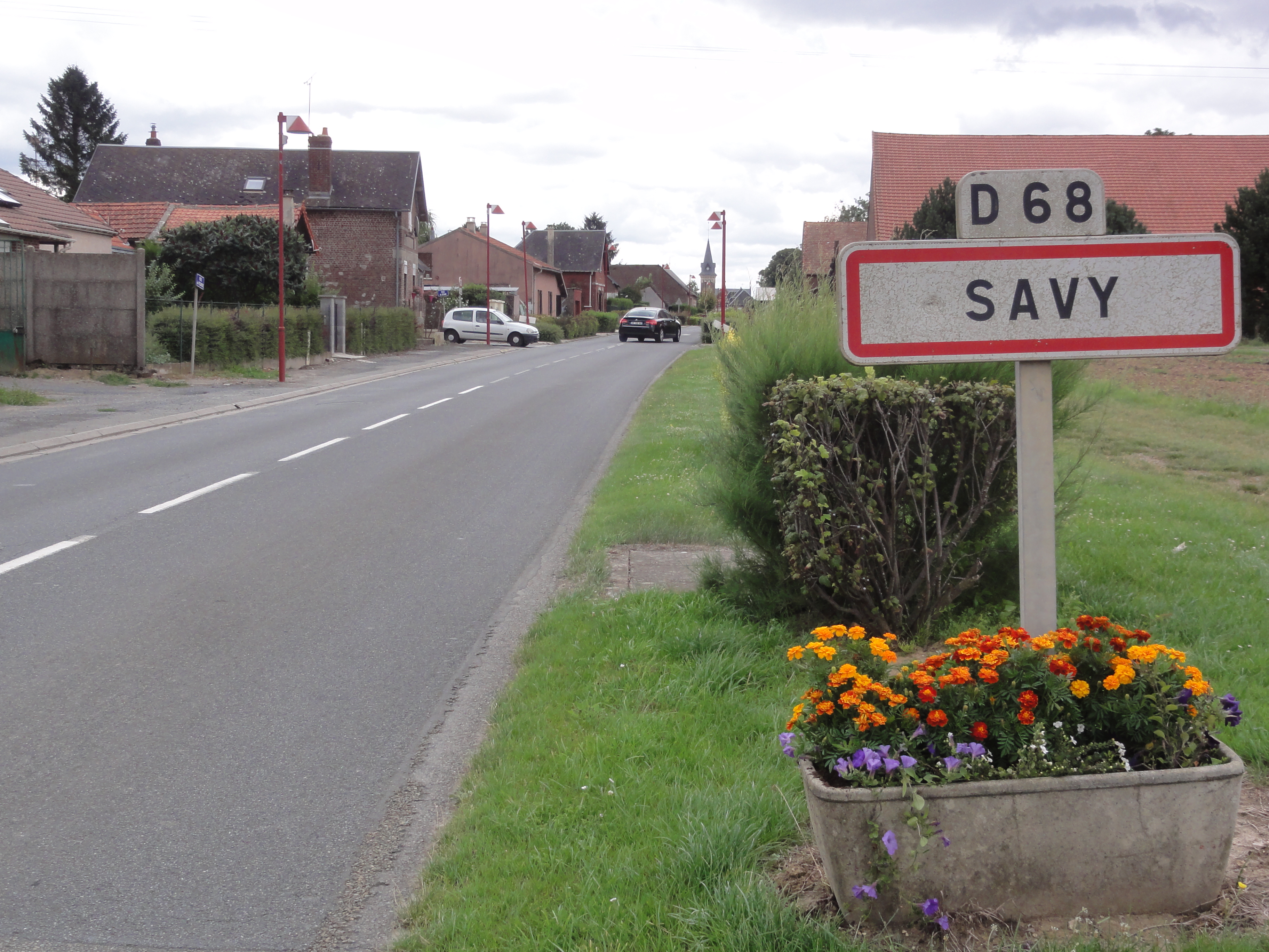 Savy (Aisne) city limit sign